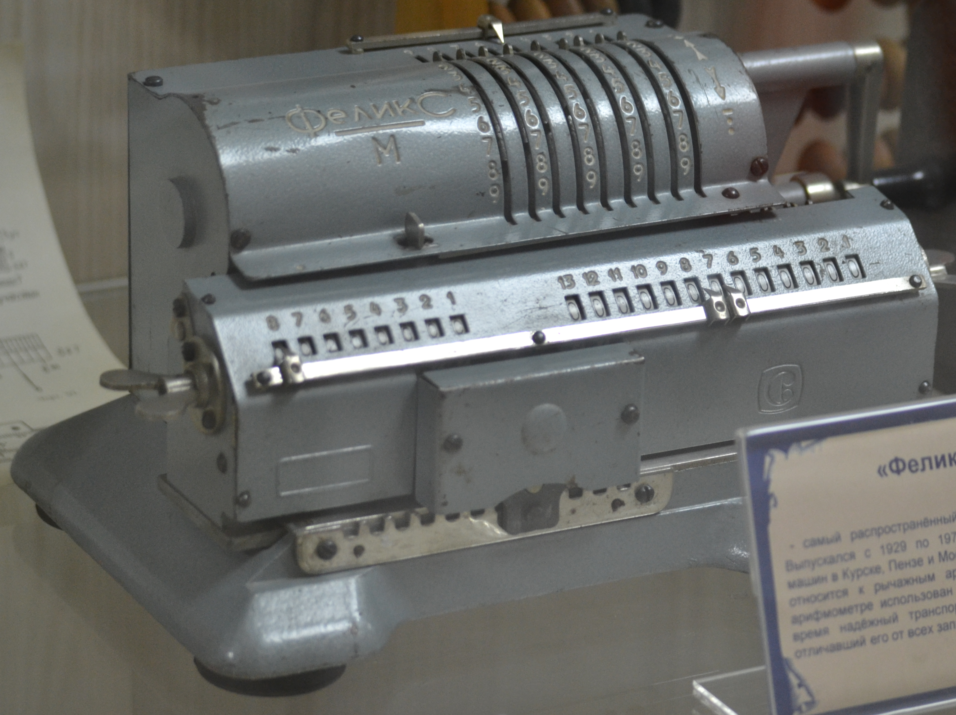 «Феликс М» — самый распространённый в СССР арифмометр. Экспонат Музея истории техники в Ростове-на-Дону.